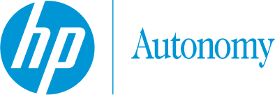 logotipo de HP Autonomy